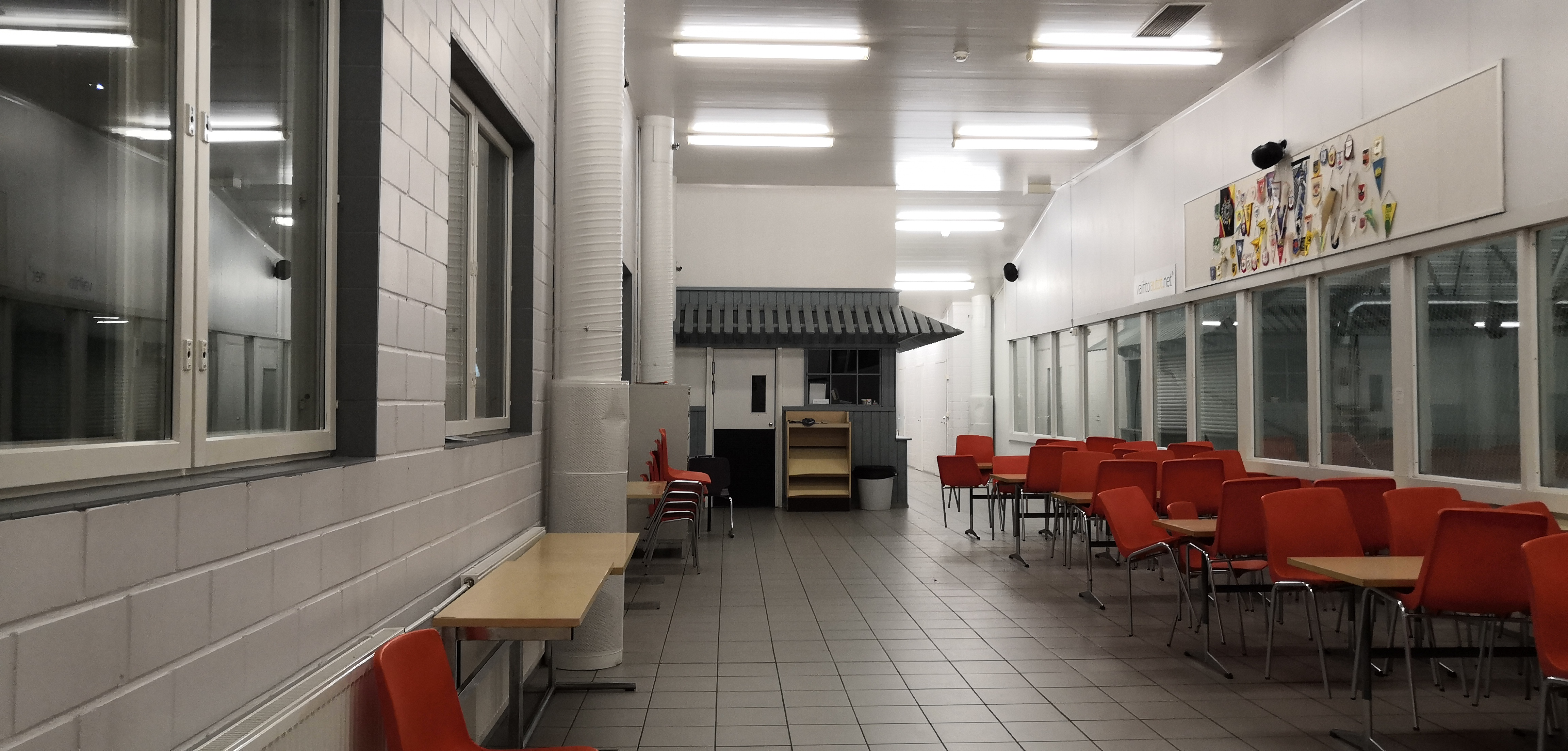 Valkealan jäähallin kahvio